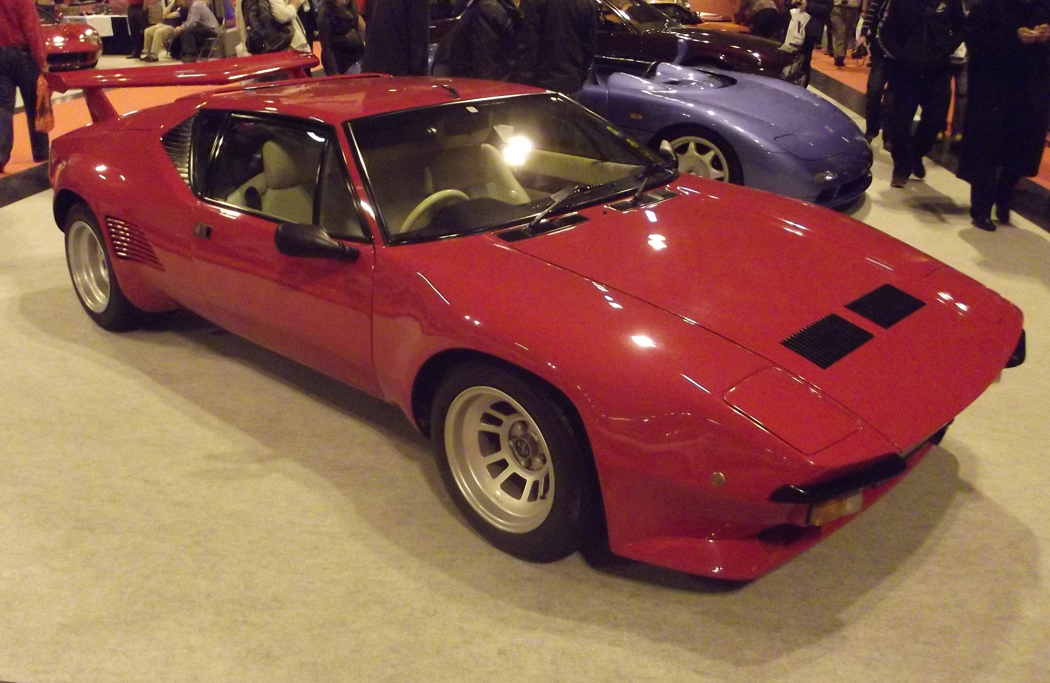 De Tomaso Pantera